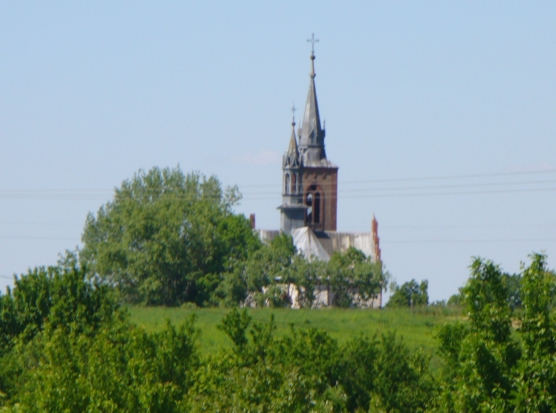 Smardzowice - kościół kościół parafialny p.w. MB Różańcowej i św. Małgorzaty